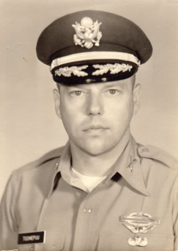 Jüri Toomepuu